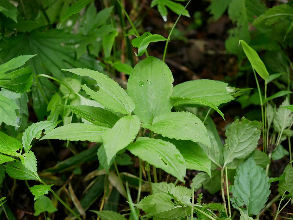 2019/06/09 愛媛県：Ehime Pref., Japan